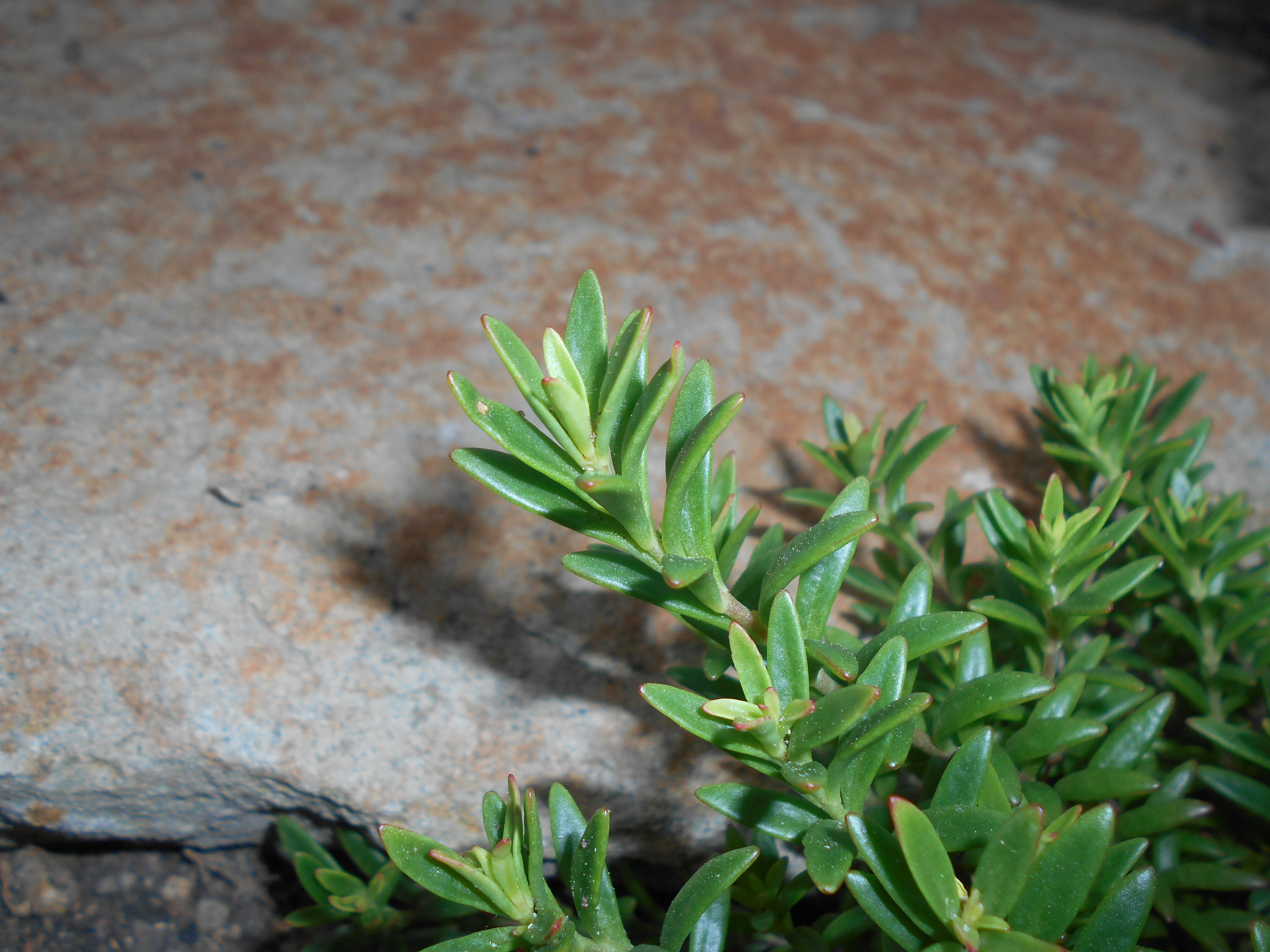 Kalanchoe jongmansii var. jongmansii, Botanischer Garten Berlin.